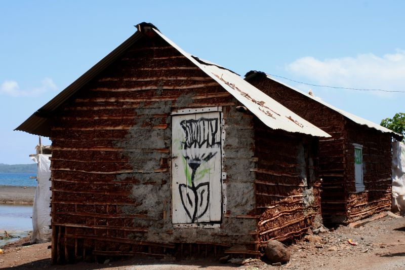 Banga : habitat traditionnel des hommes célibataires à Mayotte. Mtsamoudou.